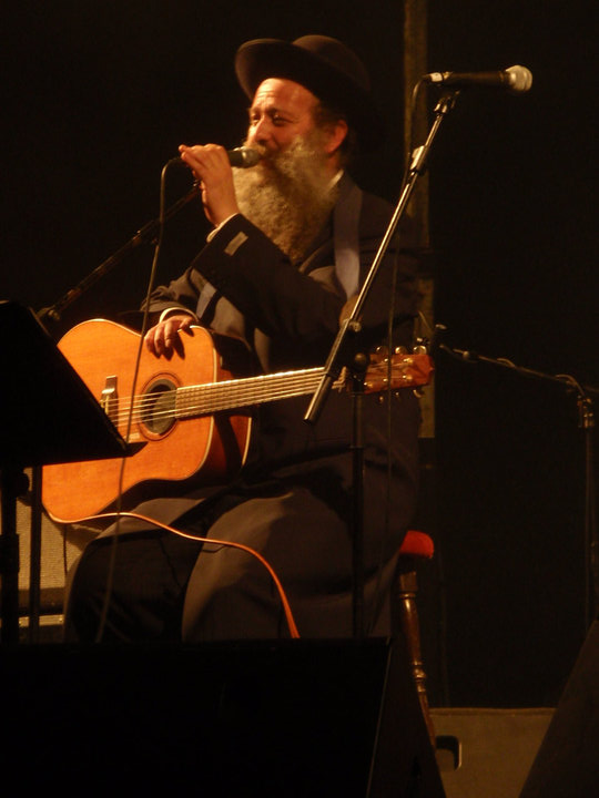 שולי רנד בהופעה בפסטיבל "חדא כנישתא" ט"ו באב התש"ע (2010)